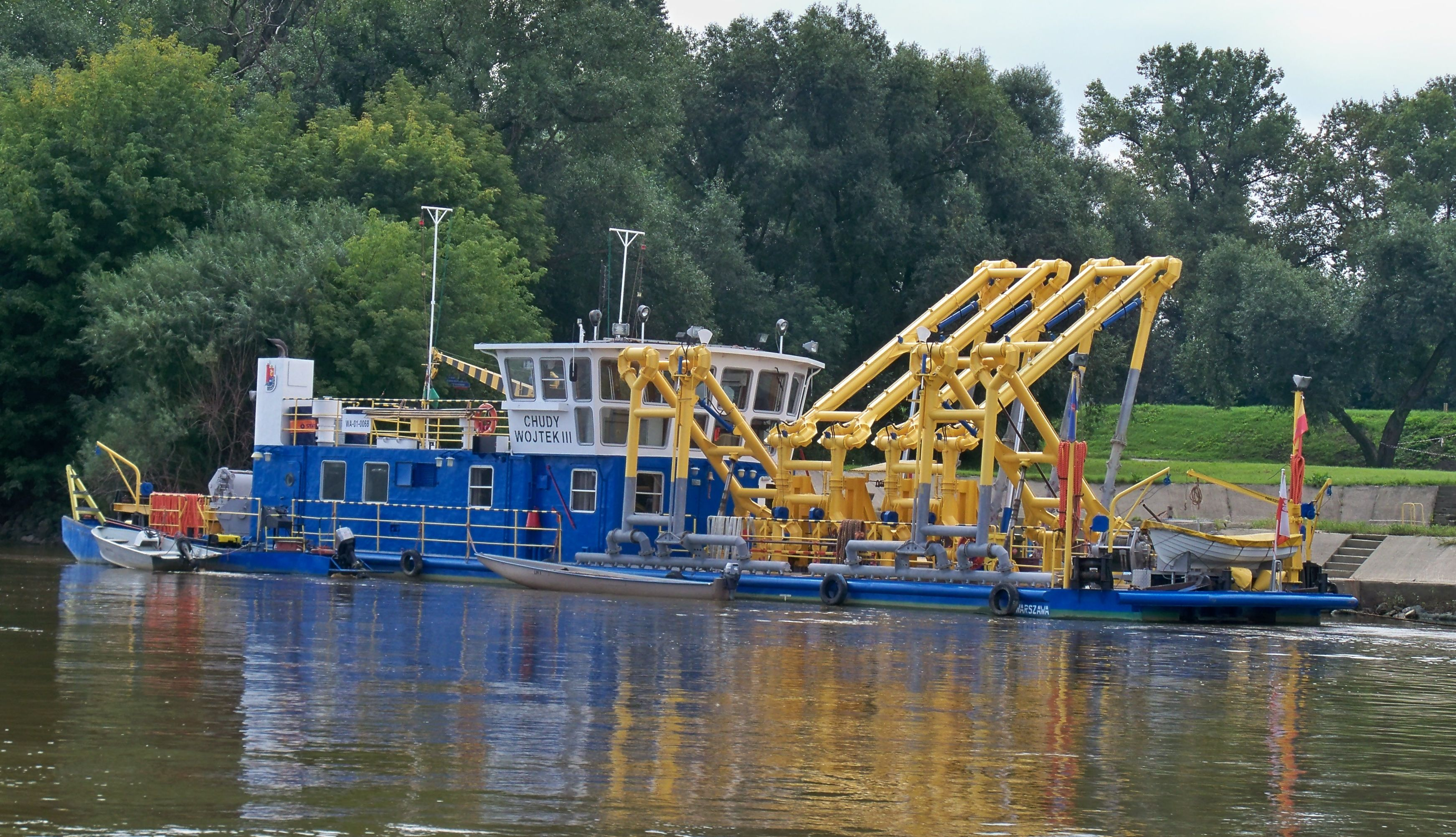 "Chudy Wojtek III" – statek spulchniacz hydrauliczny Wodociągu Praskiego przy Cyplu Czerniakowskim